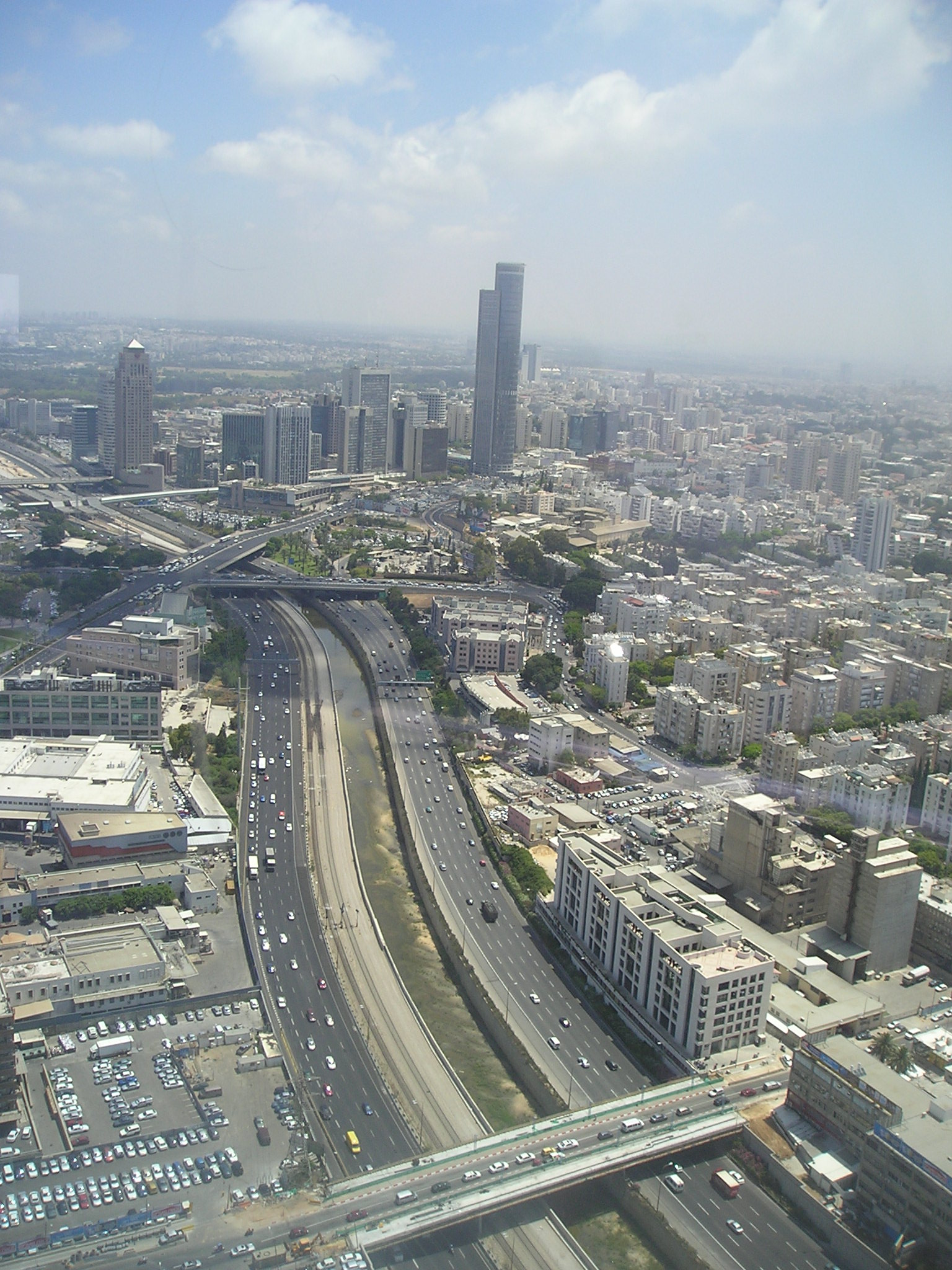 Вид на Тель-Авив